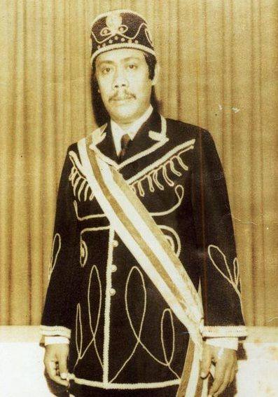 Sulu Sultan Mohammed Mahakuttah Abdullah Kiram